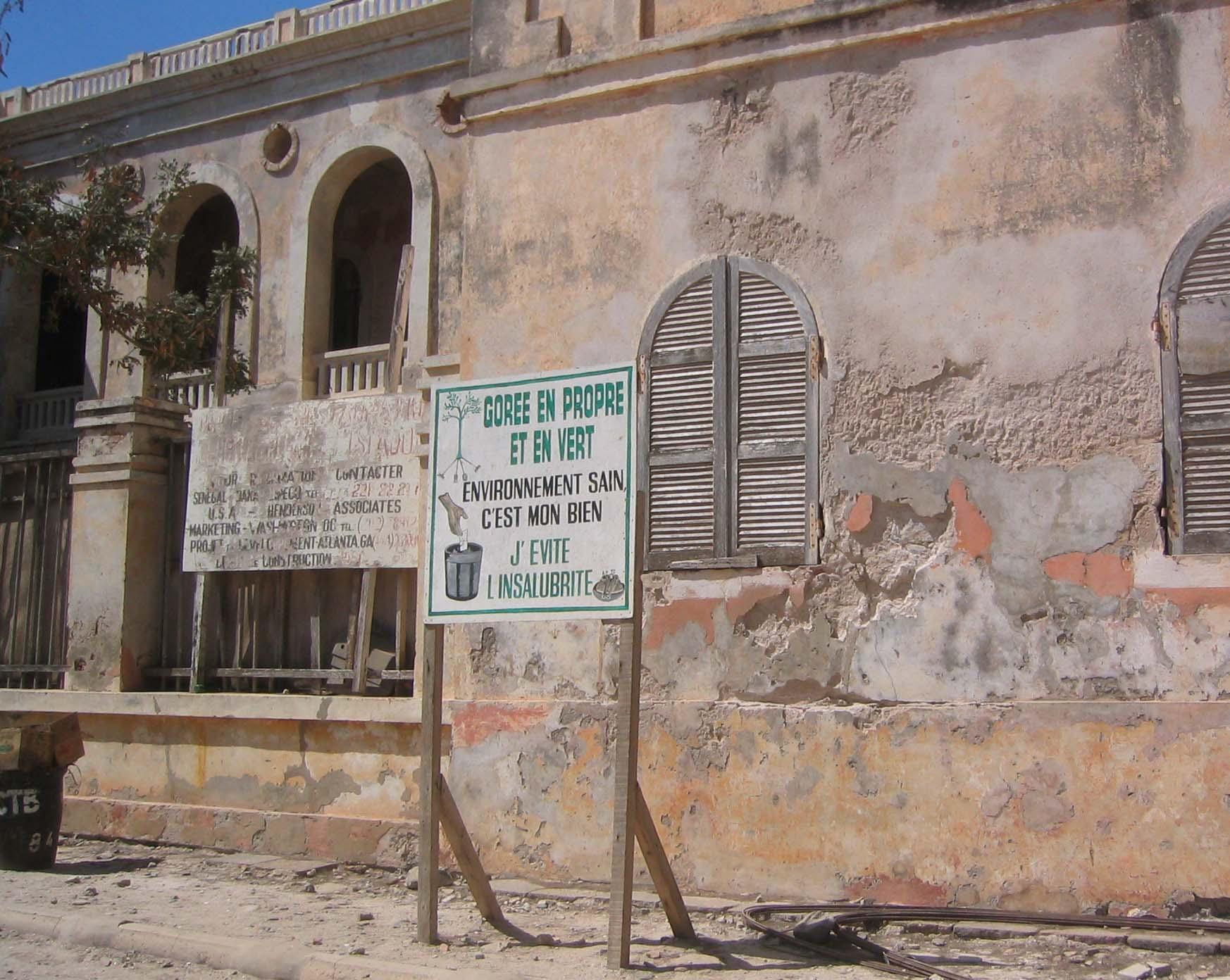 Campagne de sensibilisation à l'environnement sur l'île de Gorée (Sénégal)